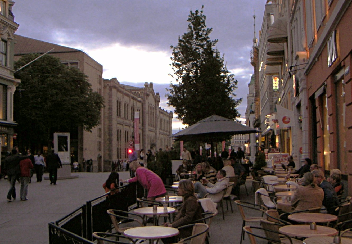 Presseklubben i Oslo.